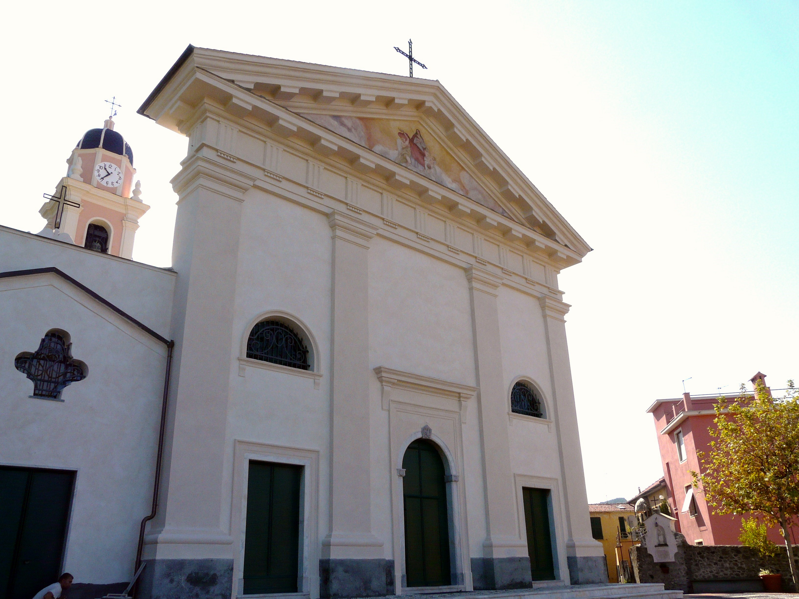 Facciata della chiesa di Santa Sabina nella frazione di Trigoso, Sestri Levante, Liguria, Italia